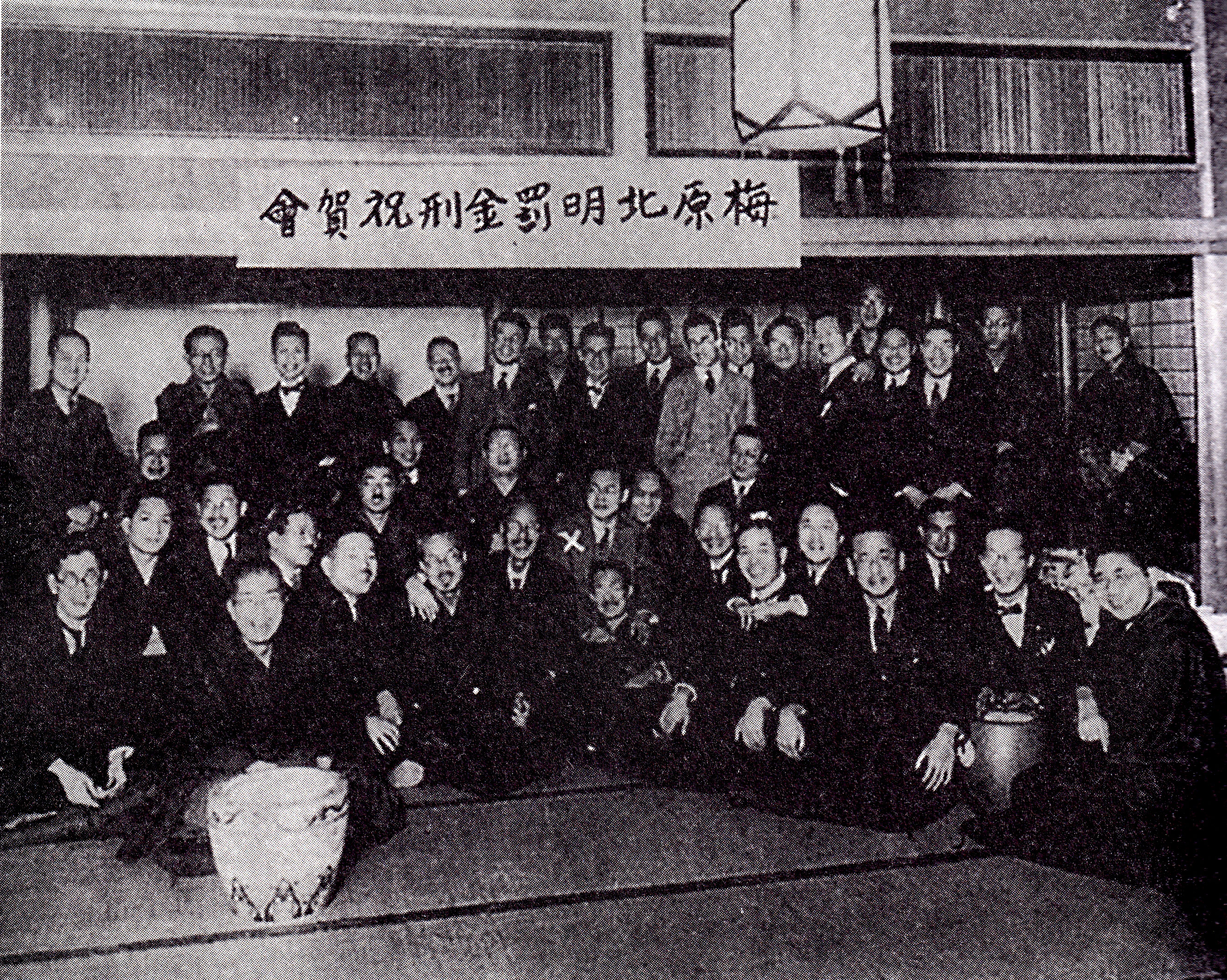 連続発禁記念に関係者40数名を集めて「罰金祝賀会」を開いた梅原北明一味。北明が1928年（昭和3年）に起こした出版法違反事件（計27件）の決着を祝って1929年（昭和4年）3月20日に上野の翠松園で華々しく催された。